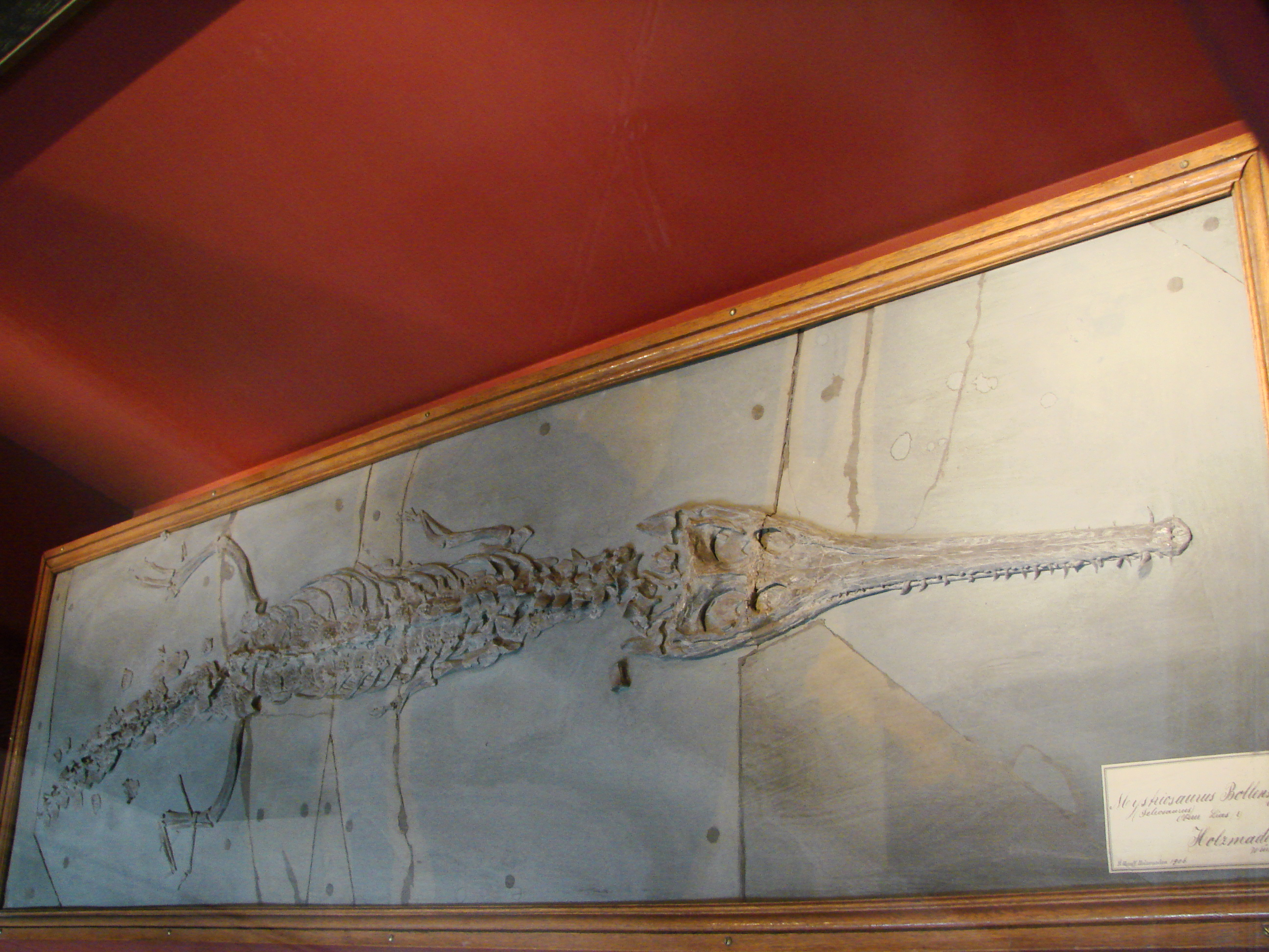 Palais de Rumine, ville de Lausanne (Suisse) : Mystriosaurus, squelette fossilisé, premier crocodile apparu il y a 180Ma, situé dans le hall d'entrée du bâtiment.